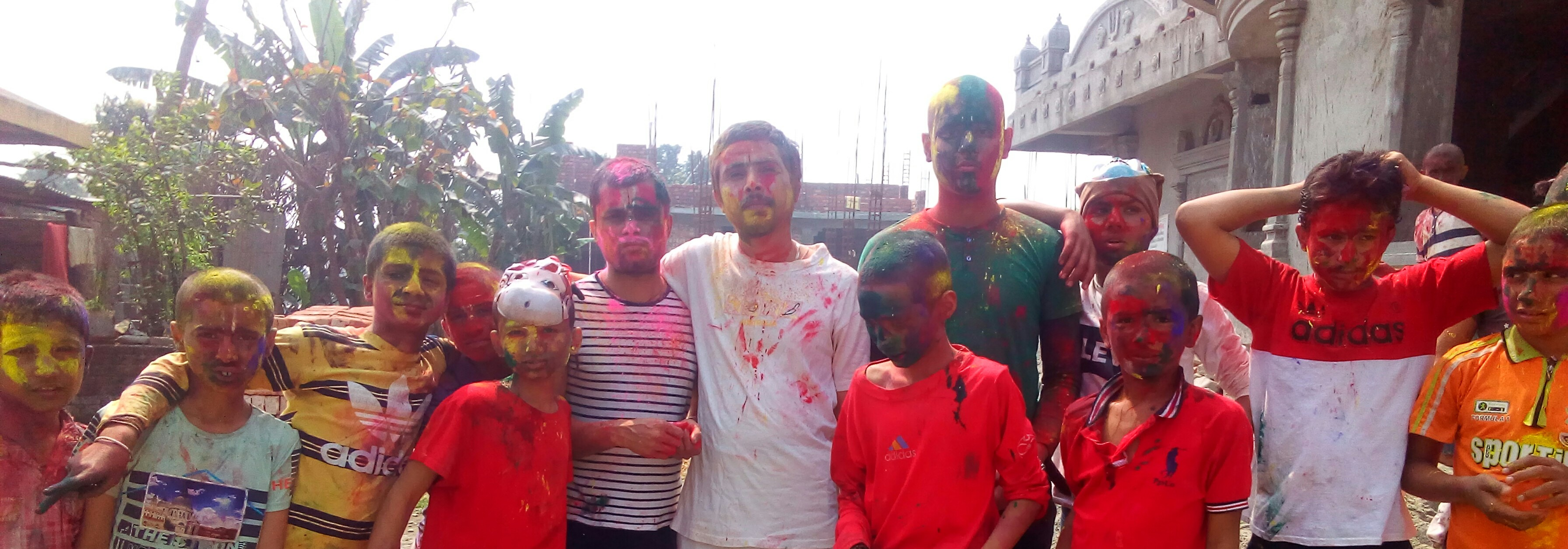 नेपाली: होली २०७४